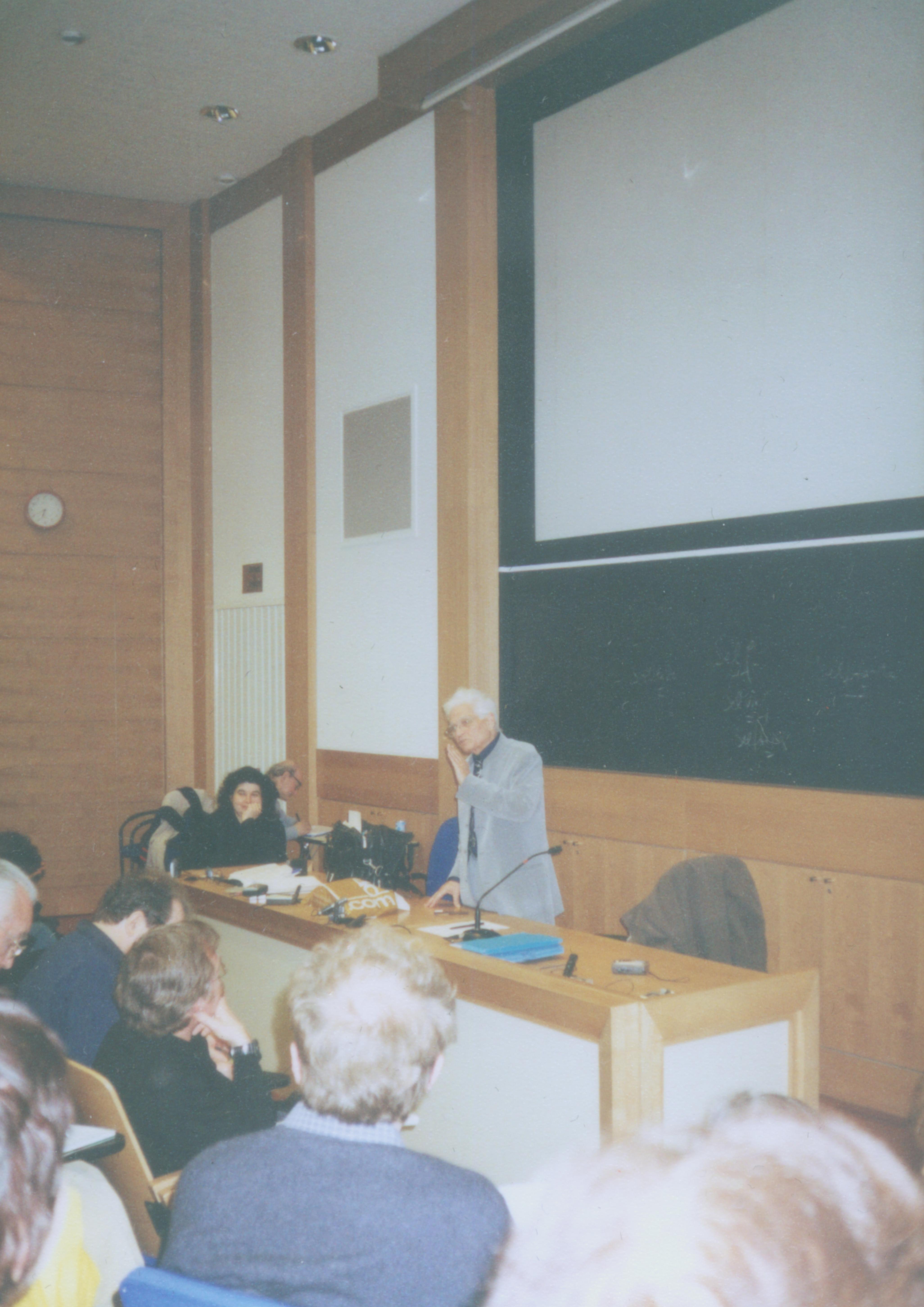 Derrida prednáša na EHESSe